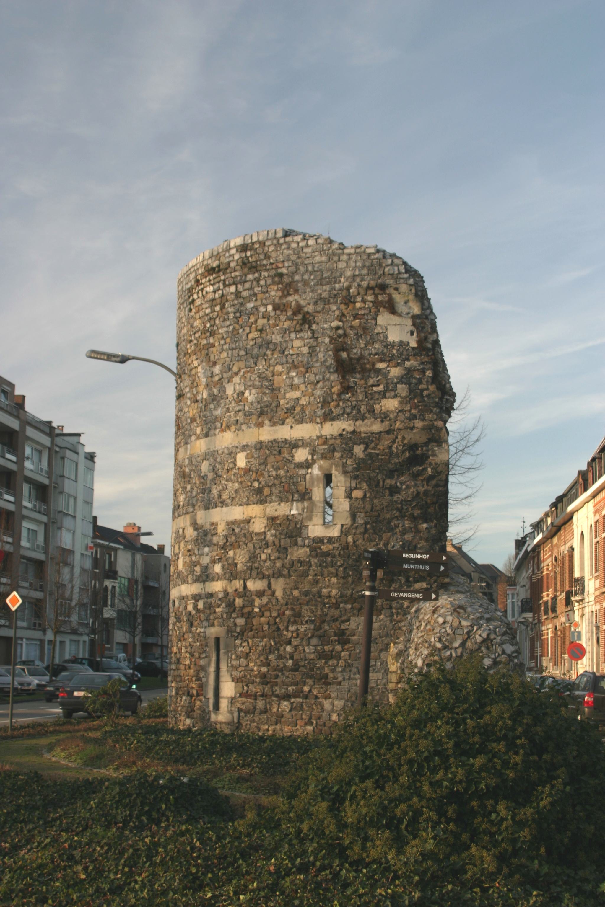 Alen Tuerm zu Tongeren.